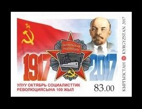 Почтовая марка Киргизии 2017 года в честь 100-летия Октябрьской революции